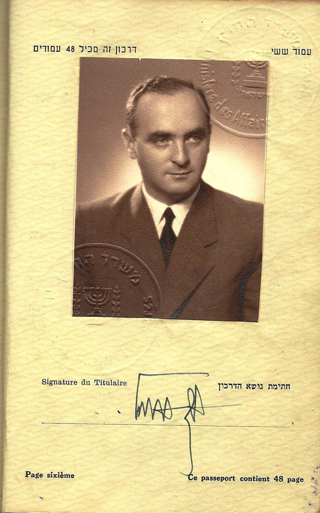 דרכונו הדיפלומטי של אהוד אבריאל משנת 1951